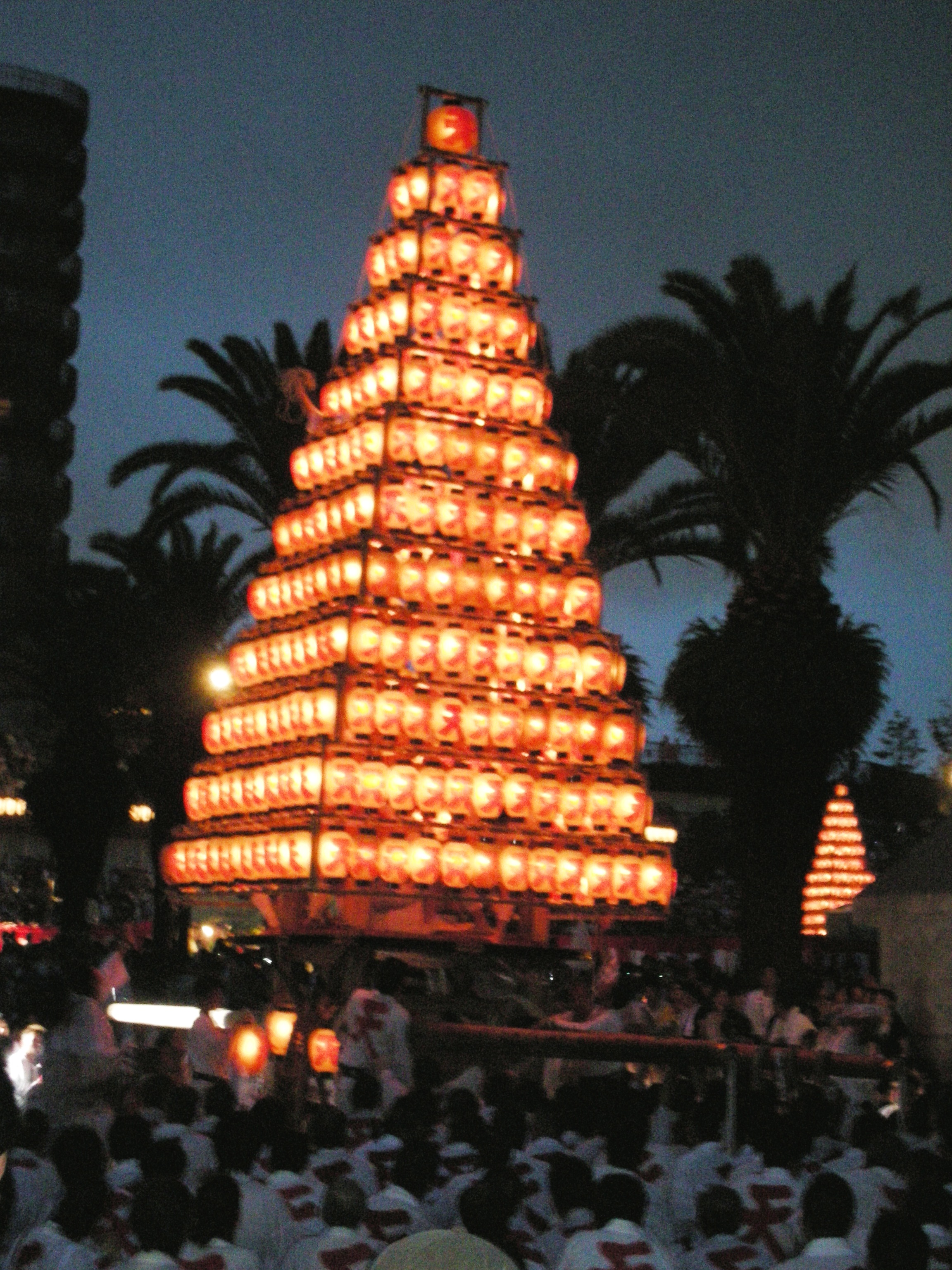 北九州市戸畑区の戸畑祇園大山笠 提灯大山笠（天籟寺大山笠）